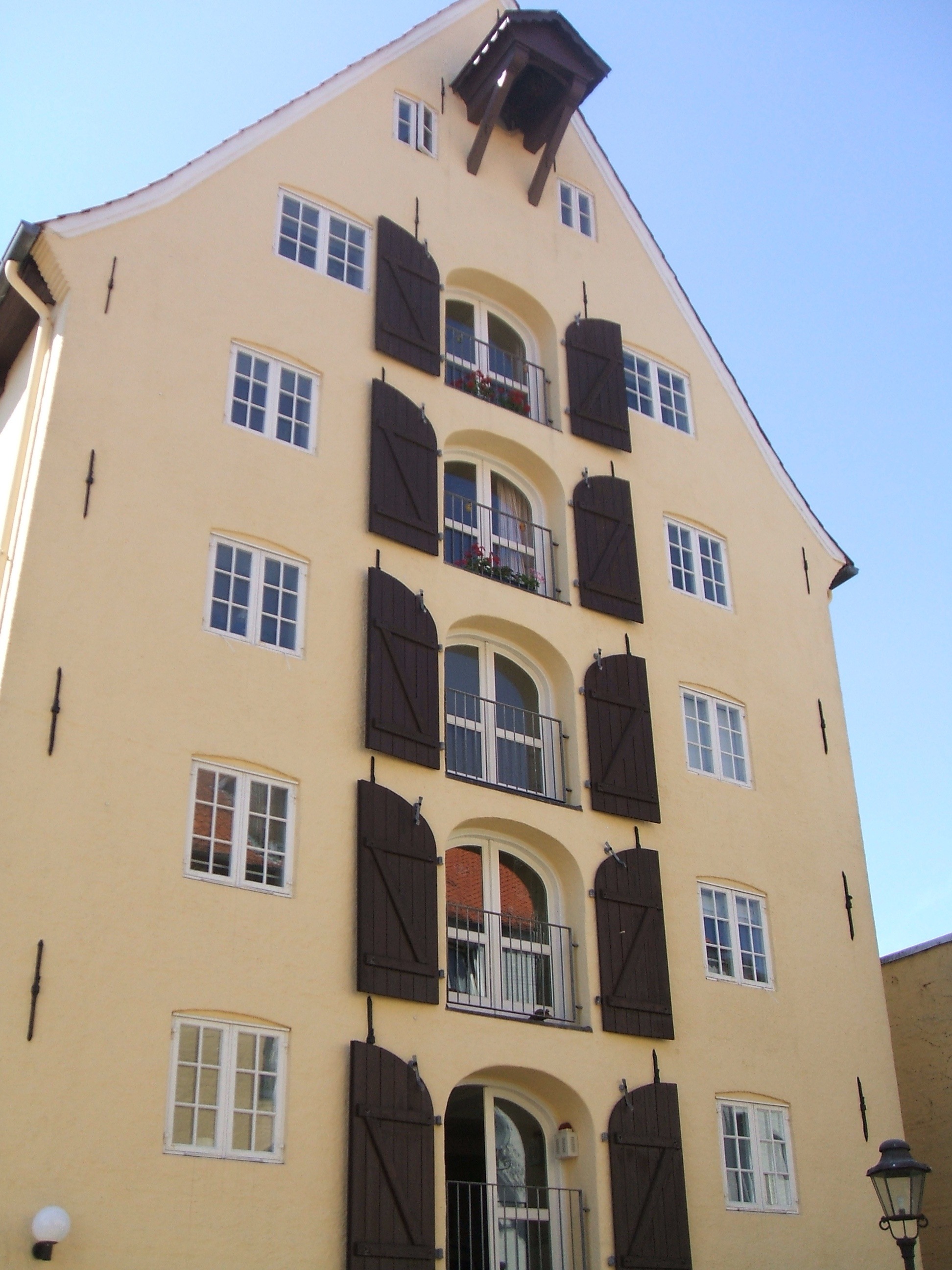 Vestindisk Pakhus i Flensborg